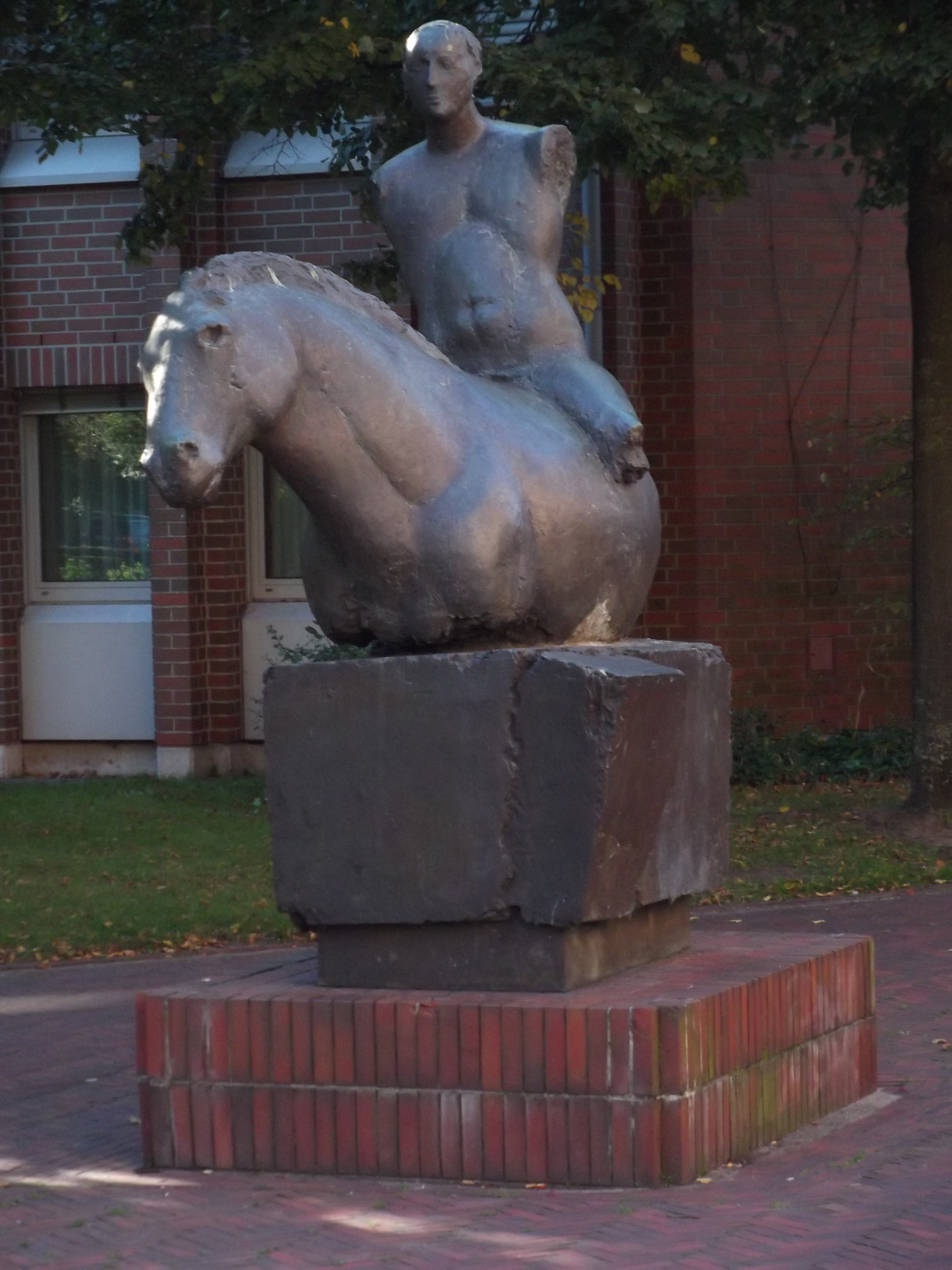 Das Denkmal Fragment eines Reiterdenkmals von Richard Heß wurde 1990 auf dem Gelände der ehemaligen Dragoner-Kaserne in Oldenburg-Osternburg, Bremer Straße, aufgestellt. Vermutlich soll es an das 1919 aufgelöste Oldenburgische Dragoner-Regiment Nr. 19 erinnern, das hier von 1859 an in der Kaserne residierte, die 1980 abgebrochen wurde zugunsten eines Neubaus der Bundeswehr, in dem bis ca. 2012 das Kreiswehrersatzamt Oldenburg untergebracht war. Am Denkmal befindet sich kein Hinweis über seinen Namen, den Künstler oder das Aufstellungsdatum. Mona Gulati: Fragment eines Reiterdenkmals, in:Meinhard Tebben (Hg.): Skulpturen und Plastiken in Oldenburg, Oldenburg (BIS-Verlag) 2001, S. 88f. ISBN 3-8142-0771-8